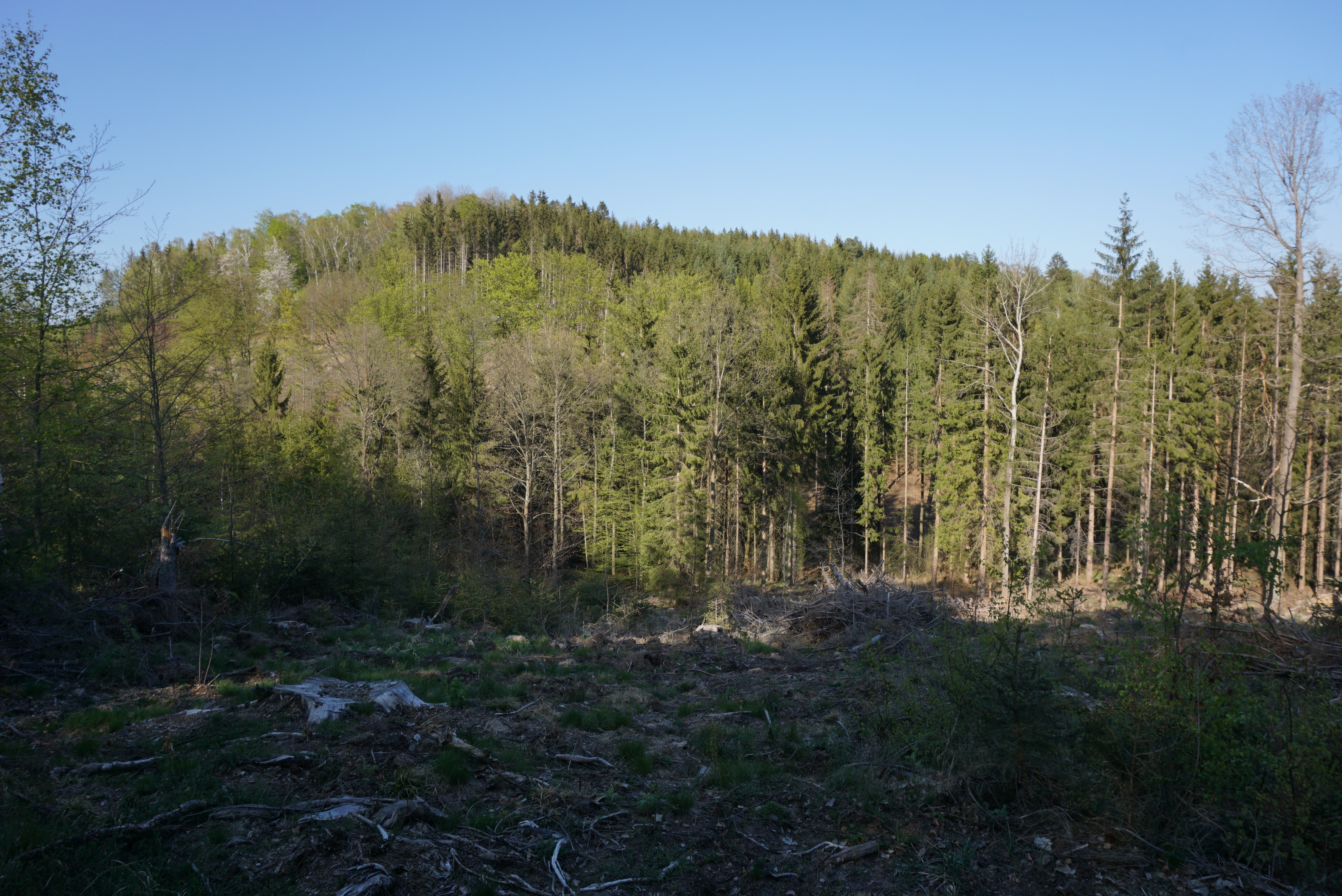 Chudý vrch (Stolleberg, 433 m) u Cvikova - pohled od JZ